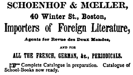 Schoenhof & Moeller